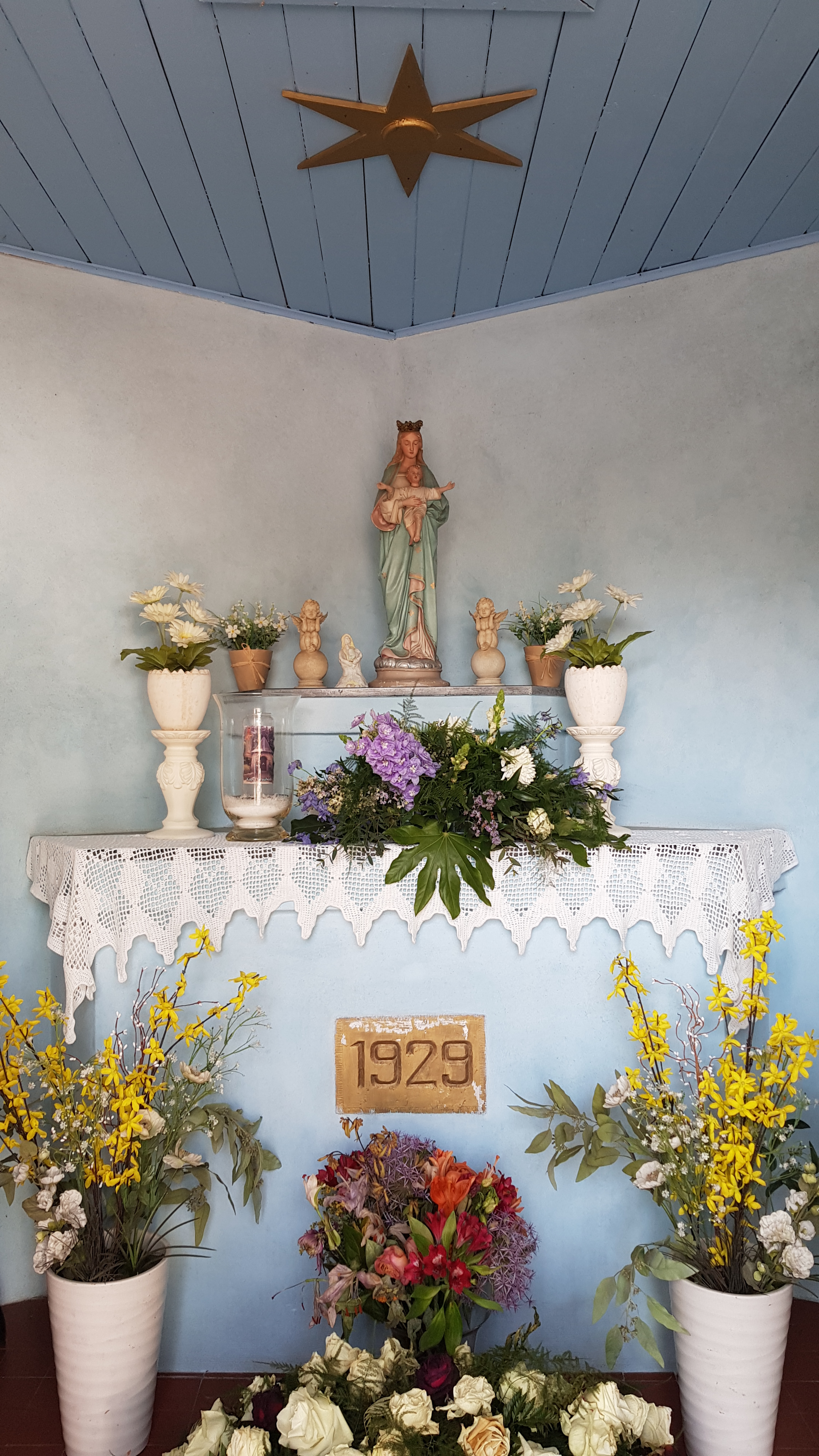 Kapel Craubekerstraat, Klimmen, Limburg, Nederland